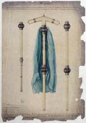 Гессэ І. Мал. посаха арх. М. Казачынскага. 1866